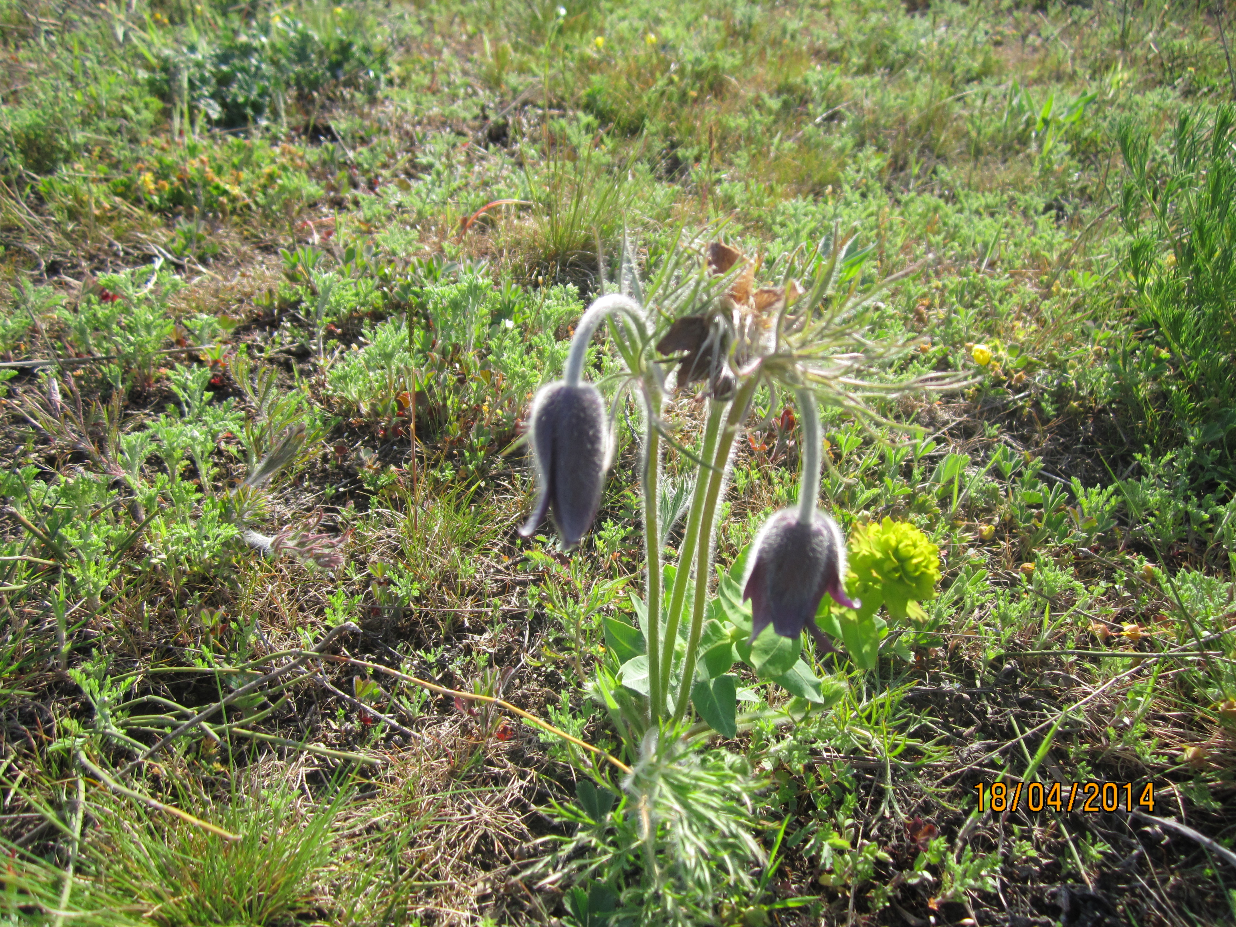 «Монастирище», Устинівський р-н, с. Завтурове